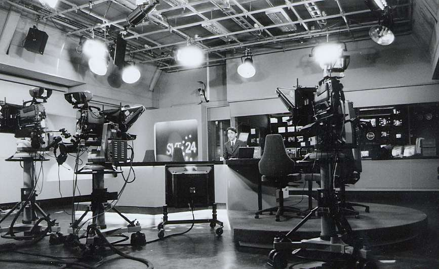 15 mars 1999 - premiär för SVT24.